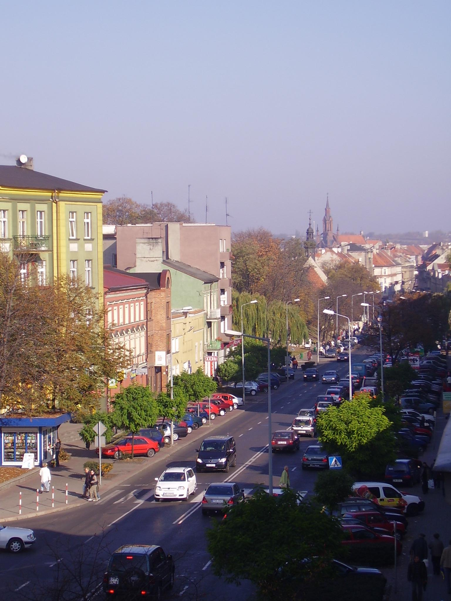 Kalisz, ulica Górnośląska